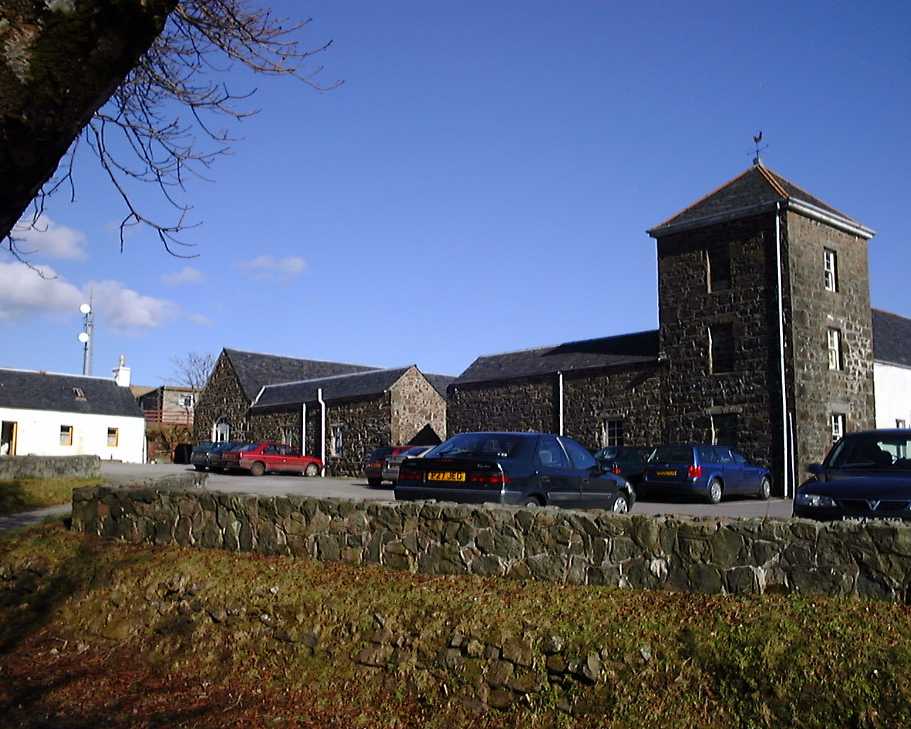 Gàidhlig: Sabhal Mòr Ostaig, Seann Togalach bho rathad Tharsgabhaig, 1998-01-30